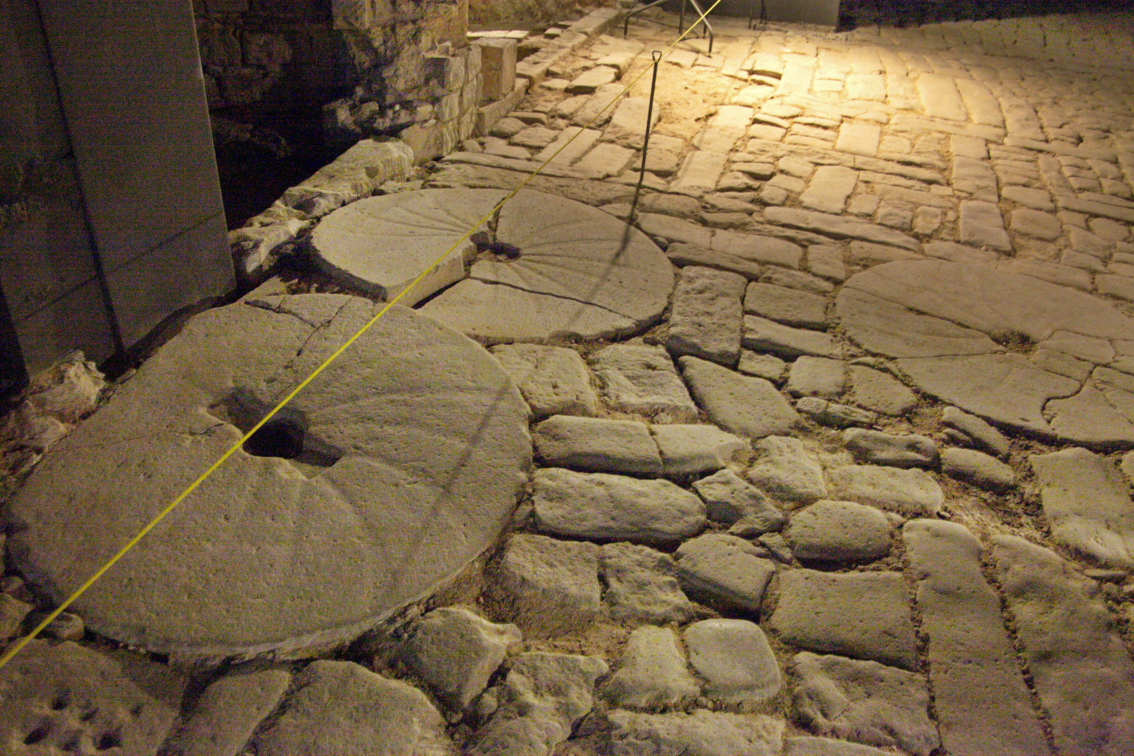 Jaciment arqueològic del Born (Barcelona, 1717).